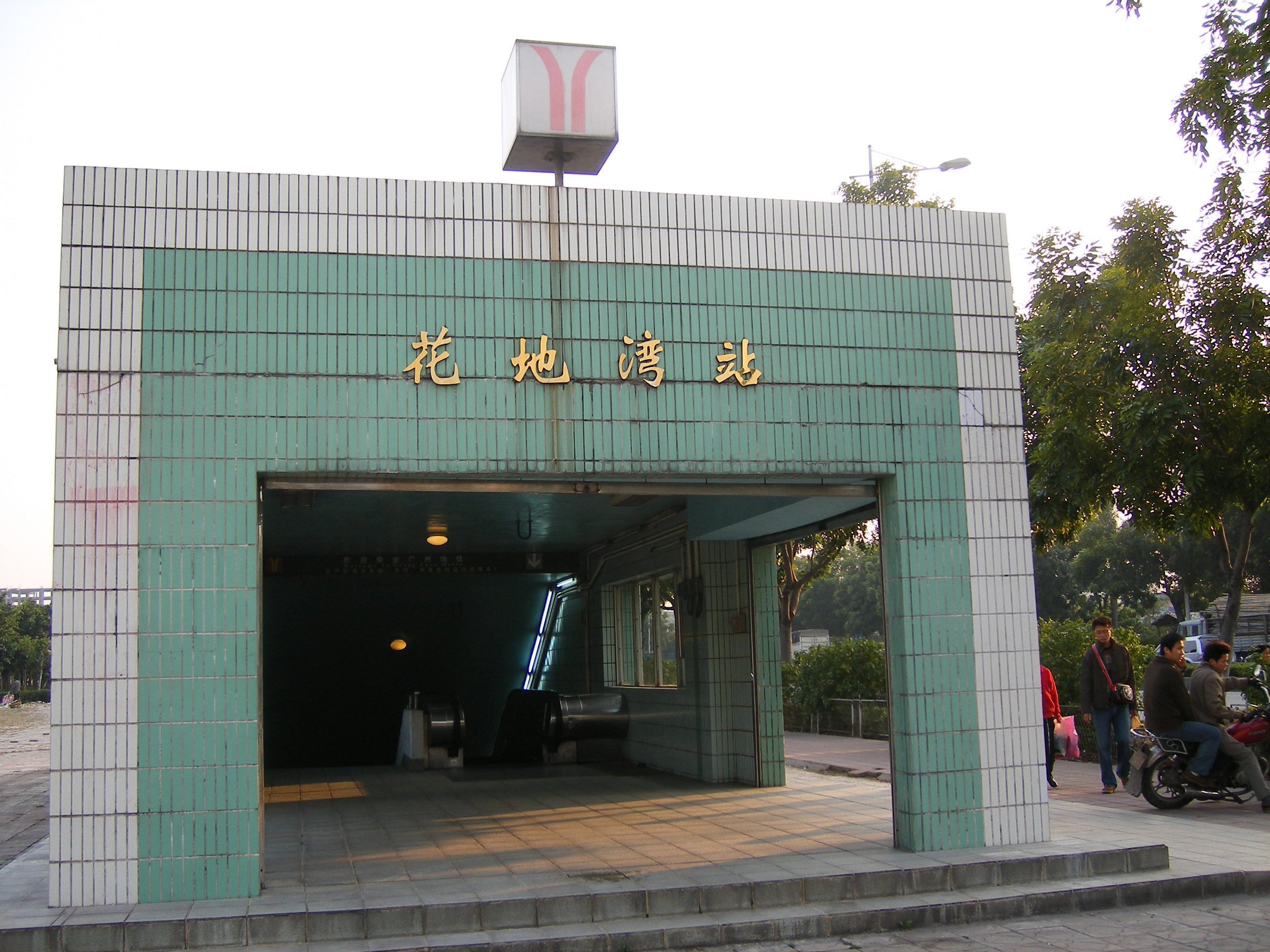 广州地铁花地湾站出入口。